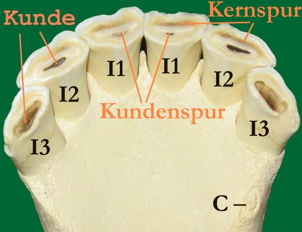 Schneidezähne des Unterkiefers eines Pferdes, etwa 6 Jahre alt Die Kunde von I1 ist abgerieben (Kundenspur), Kernspur an I1 und I2 bereits sichtbar (I1-I3 Incisivi, C Caninus). eigene Aufnahme, GNU-FdL,--Uwe Gille 16:46, 28. Nov 2004 (CET)